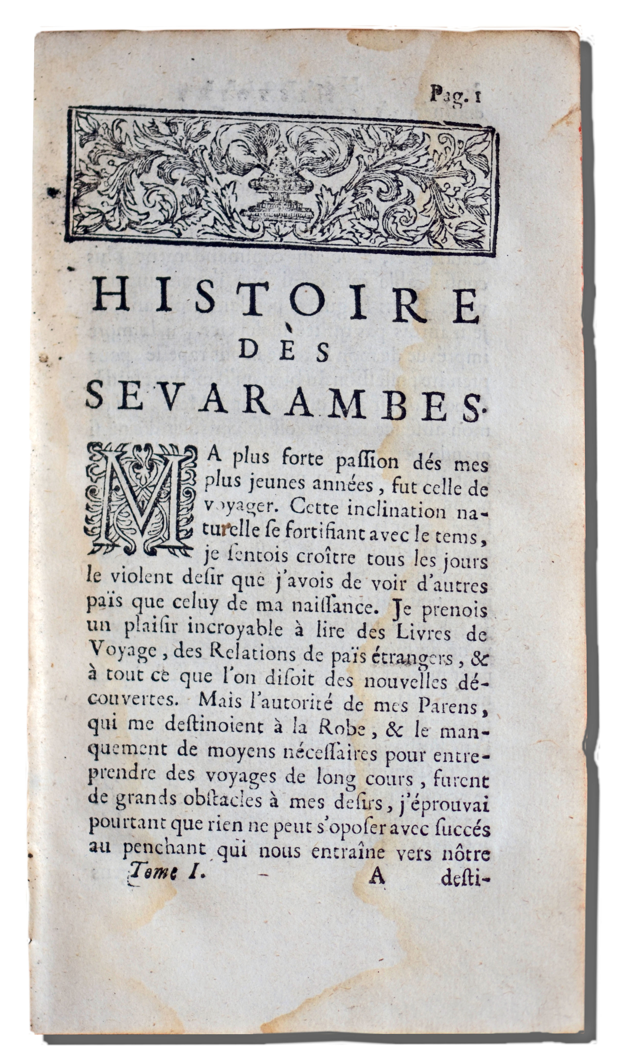 Première page du texte (après l'introduction) de lHistoire des Sevarambes, Peuples qui habitent une partie du troisième continent, communément appelé La terre australe, contenant une relation du Gouvernement, des moeurs, de la religion & du langage de cette nation, inconnue jusqu'à présent aux peuples de l'Europe, une utopie romancée qui intègre l'hypothèse de l'existence de" Terres Australes" non découvertes dans l'océan Indien au sud-est du cap de Bonne-Espérance. Le texte (première partie) est présenté comme un ouvrage historique ou géographique de l'époque, comme si les lieux et personnages existaient vraiment. "Nouvelle édition, corrigée & augmentée par l'éditeur Henry Desbordes à Amsterdam en 1734.